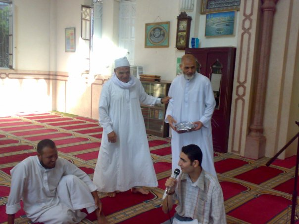 مسجد الصفا